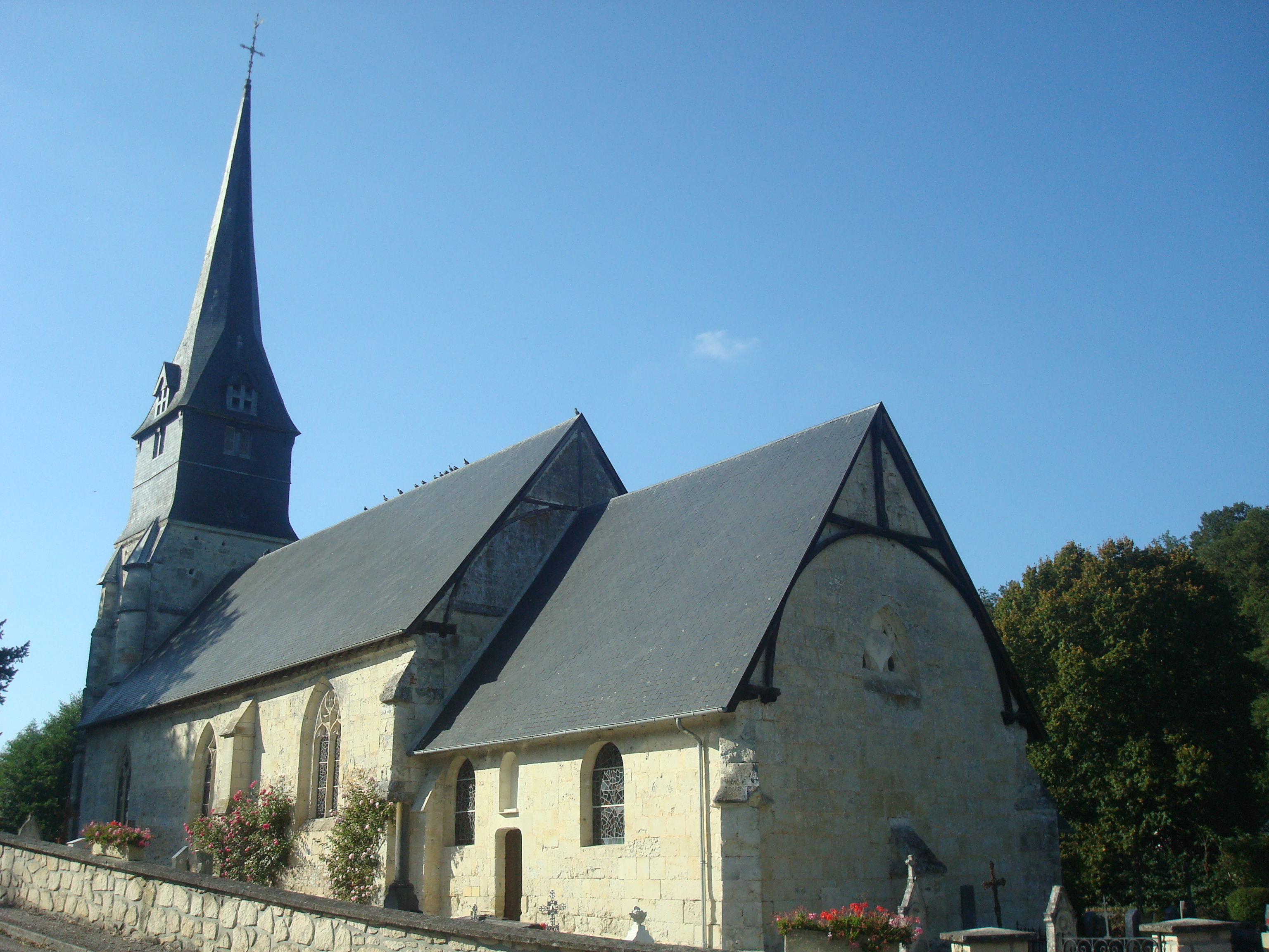 Église Sainte-Marguerite, (Inscrit, 1933) .